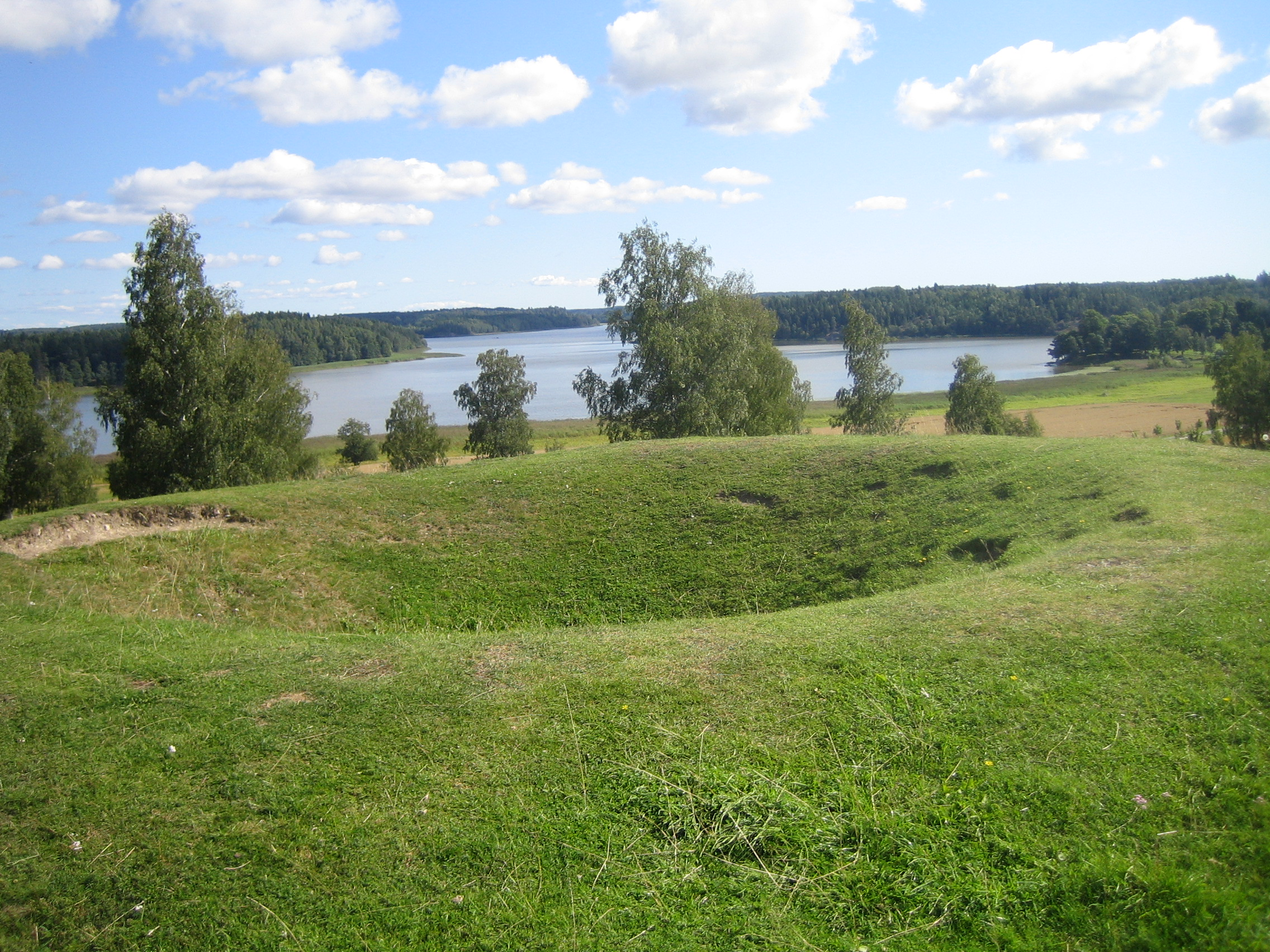 Egen bild IN433 19 oktober 2005 kl.22.47 (CEST)